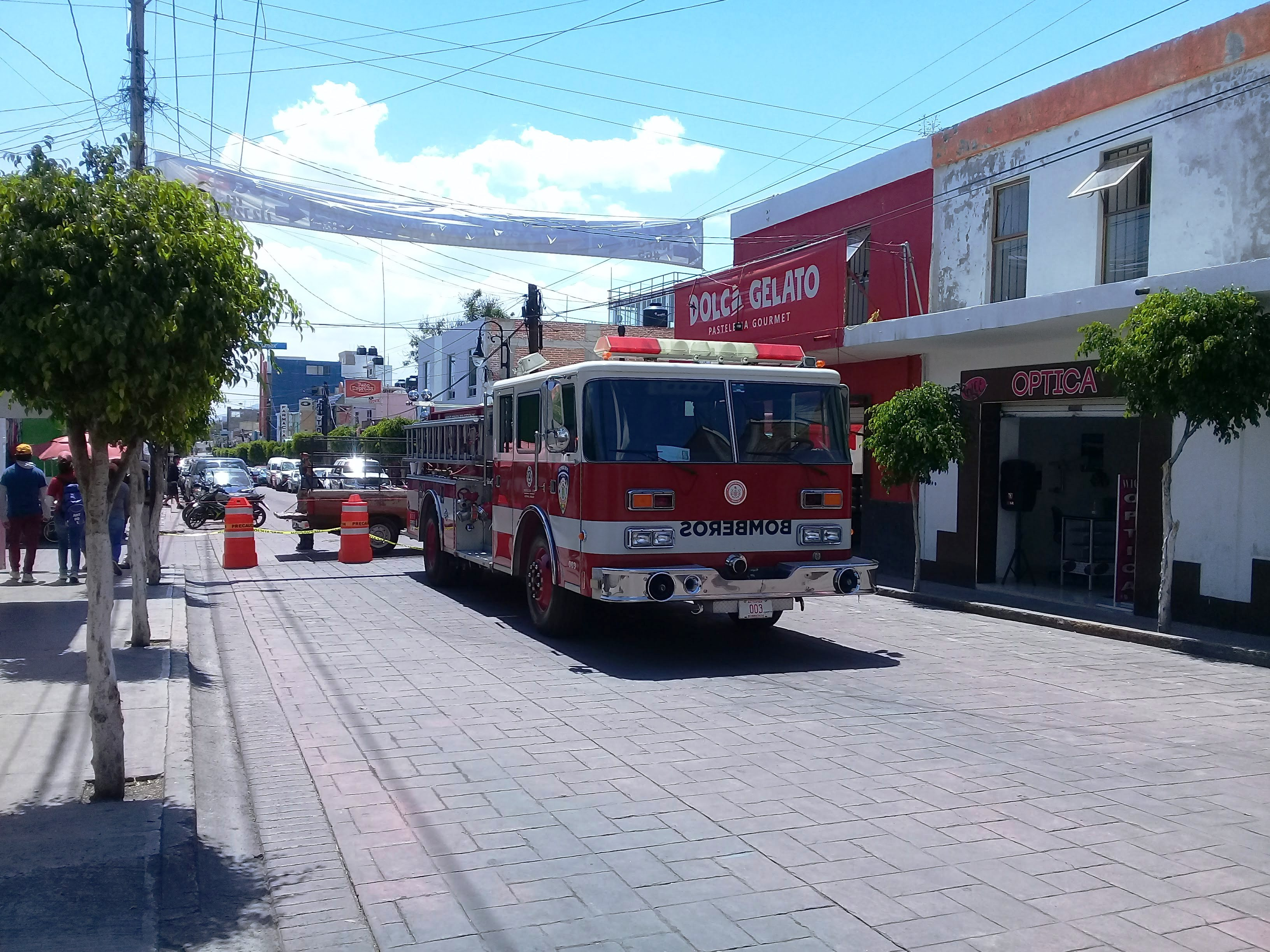 Plaza Juárez en Actopan, Hidalgo, México.